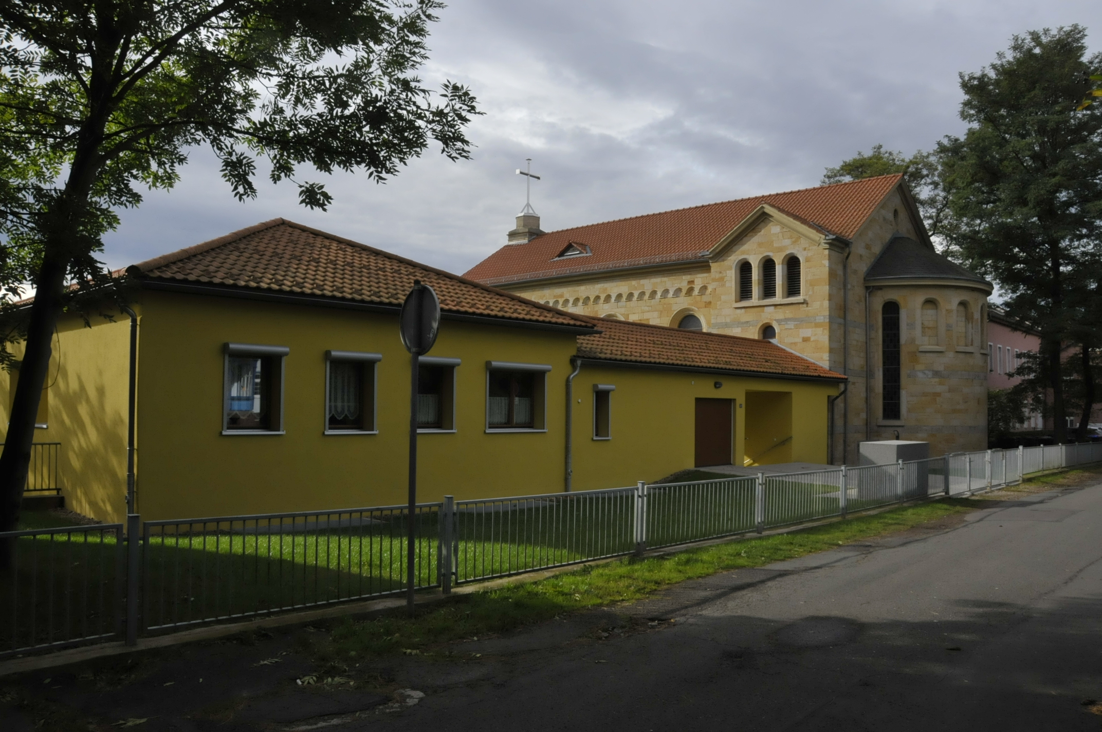 Gotha, Schützenallee 22, kath. St. Bonifatius-Kirche